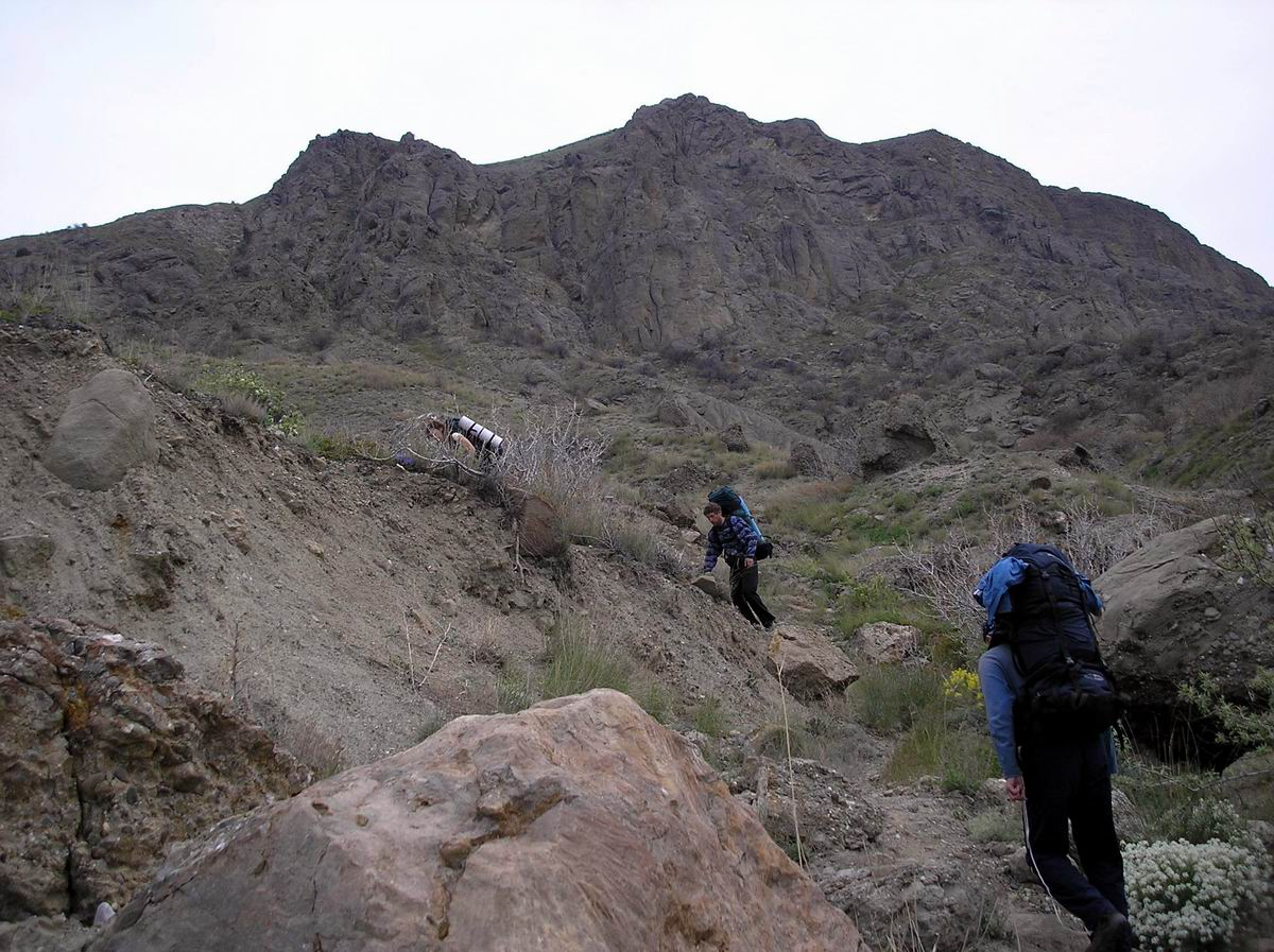 Мис Меганом, Крим